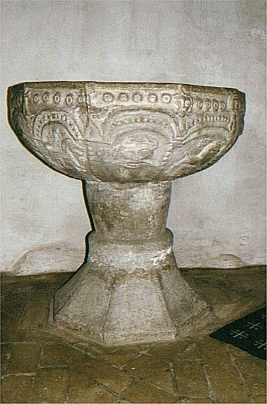 Magleby Kirke (Vordingborg Kommune) i Danmark. Magleby kirke, døbefont